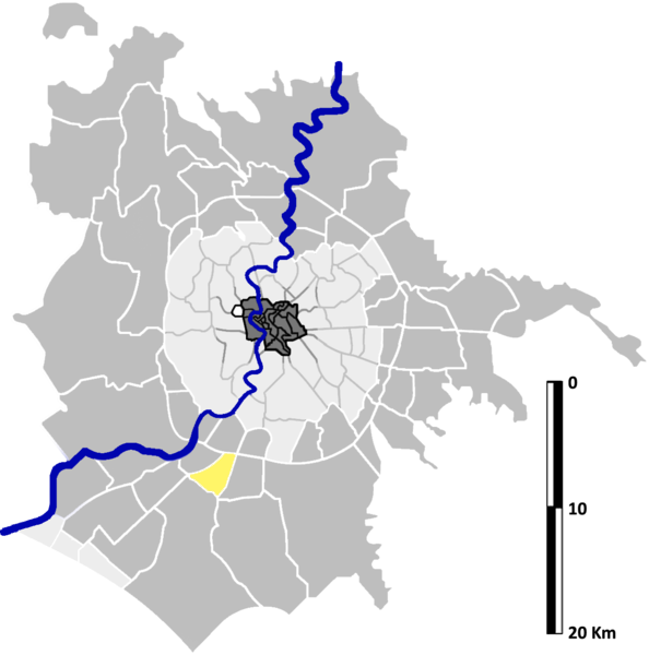 Tor de' Cenci